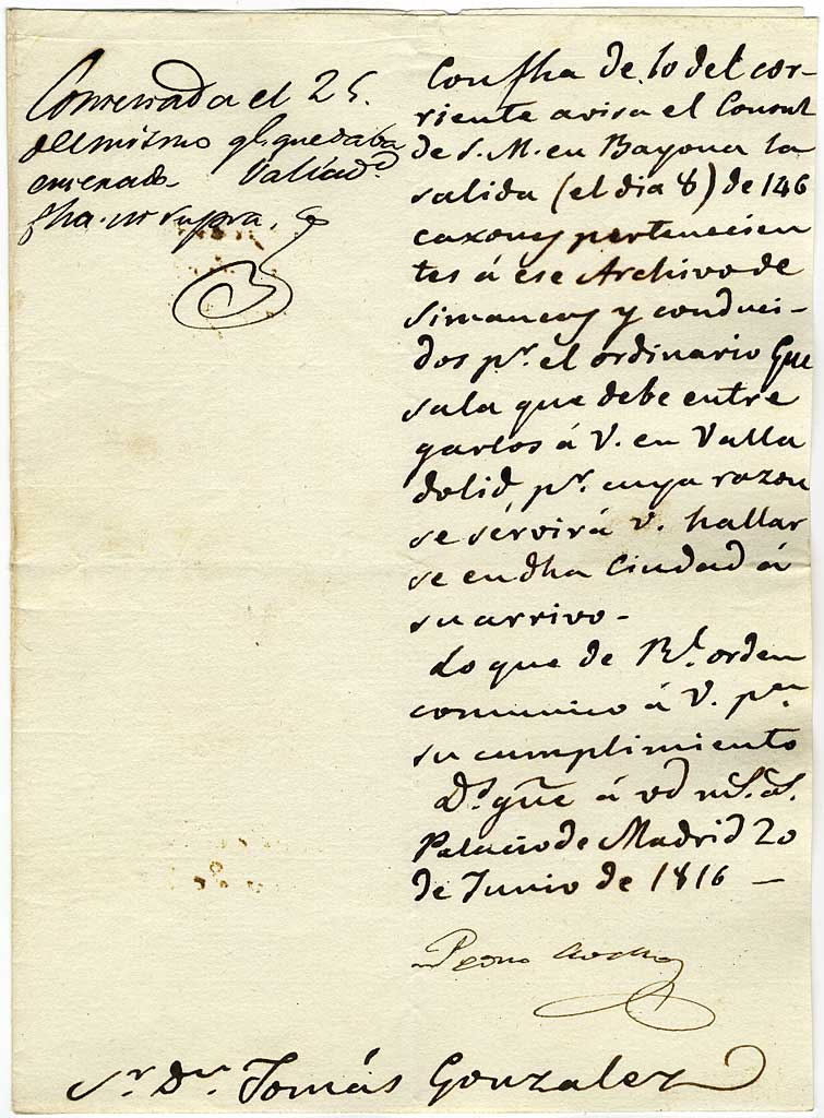 Real Orden de 20 de junio de 1816 en la que se manda a Tomás González a Valladolid a recibir 146 cajones pertenecientes al Archivo de Simancas. Éstos cajones retornan de Bayona, donde habían ido a parar por orden de Napoleón durante la invasión francesa. El documento lo firma Pedro Ceballos.